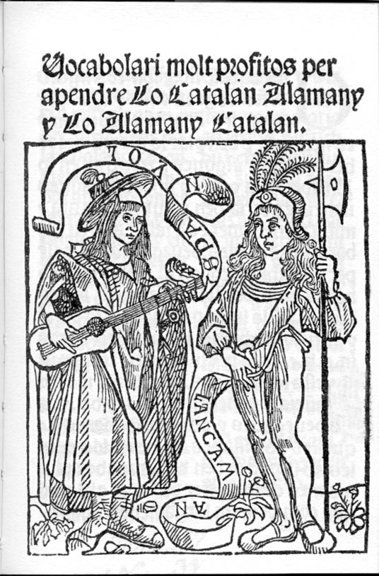 Reproducció de la portada del llibre "Vocabulari molt profitos per apendre Lo Catalan Alamany y Lo Alamany Catalan" de Joan Rosembach (publicat a Perpinyà, any 1502)